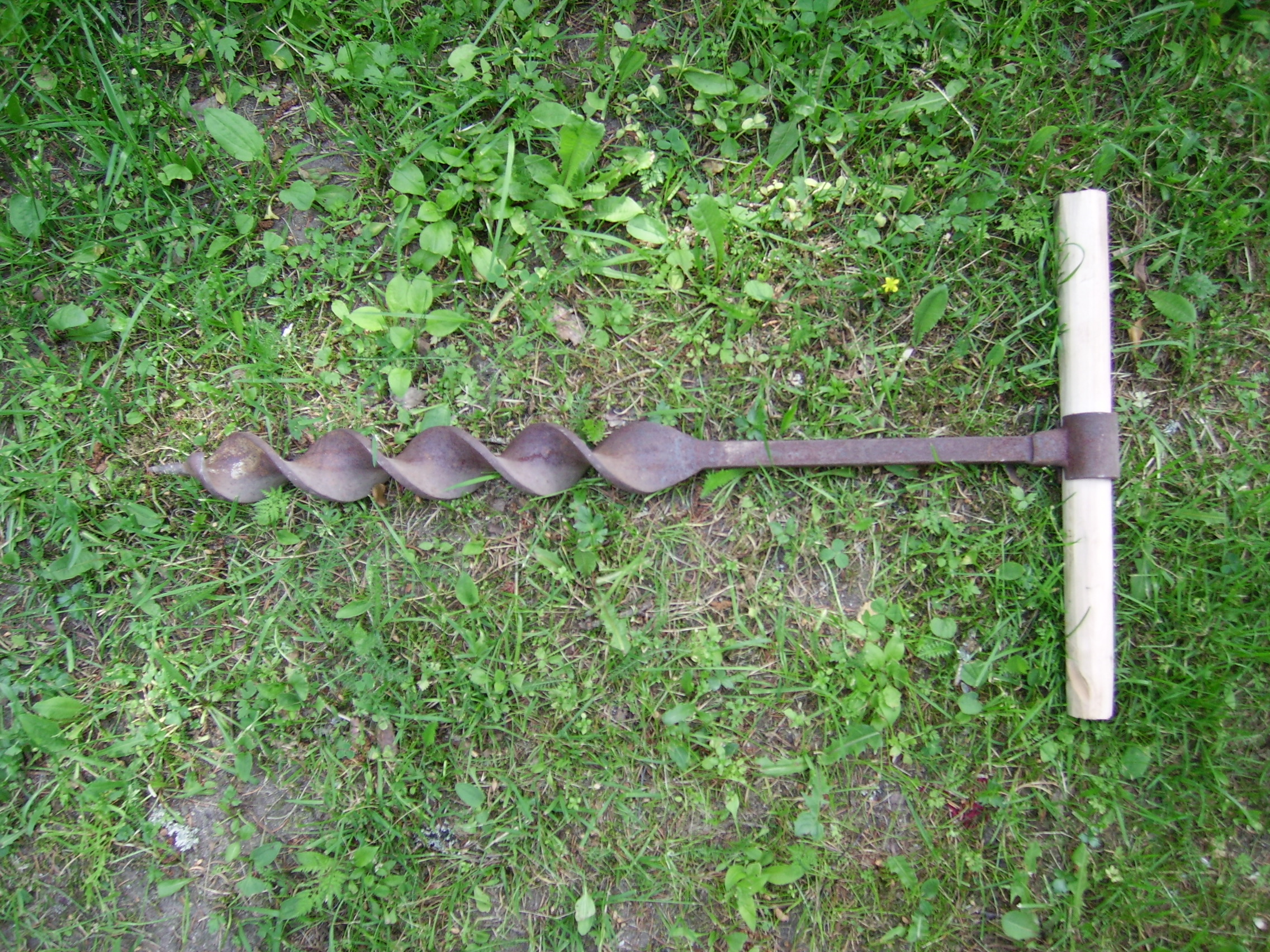 Hirsien tapitukseen käytetty kaira